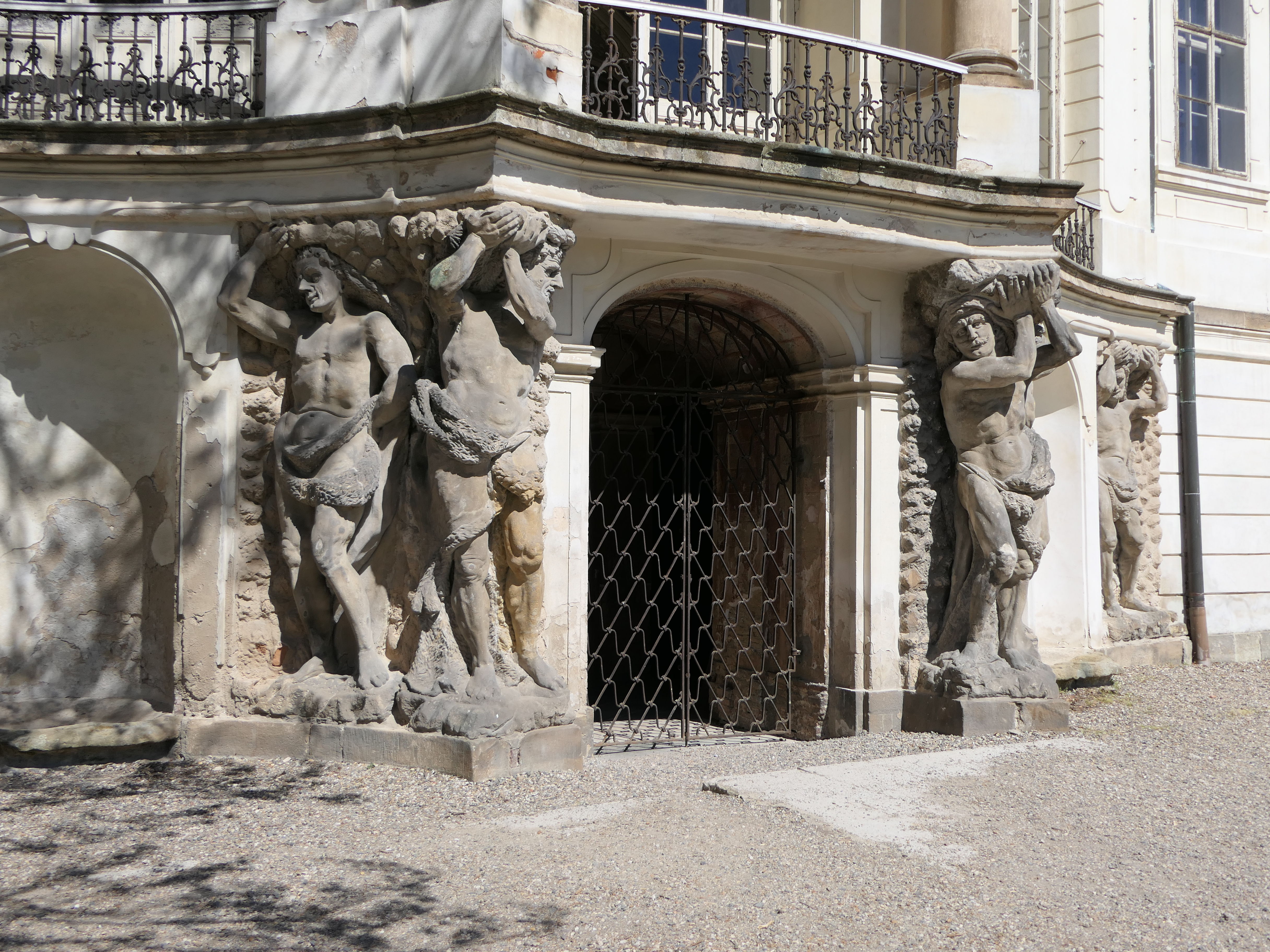 Schloss Ploskovice - Eingang zur Grotte im südlichen Erdgeschoss